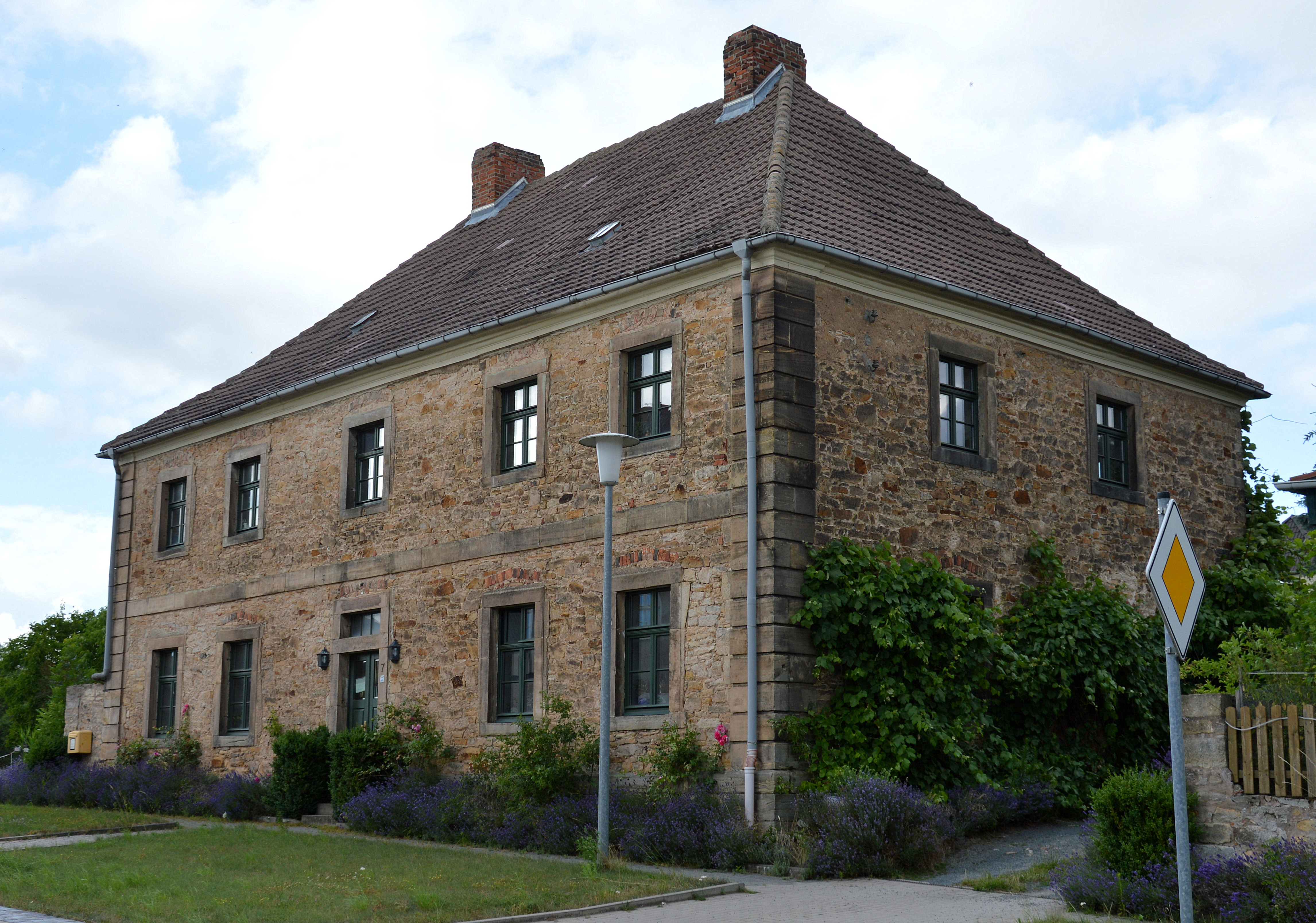 Haus Dorfstraße 7 in Groß Bartensleben